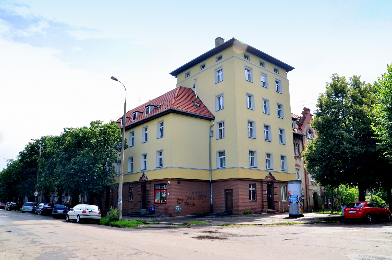 Gorzów Wielkopolski - budynek u zbiegu ulic Fabrycznej i Waryńskiego